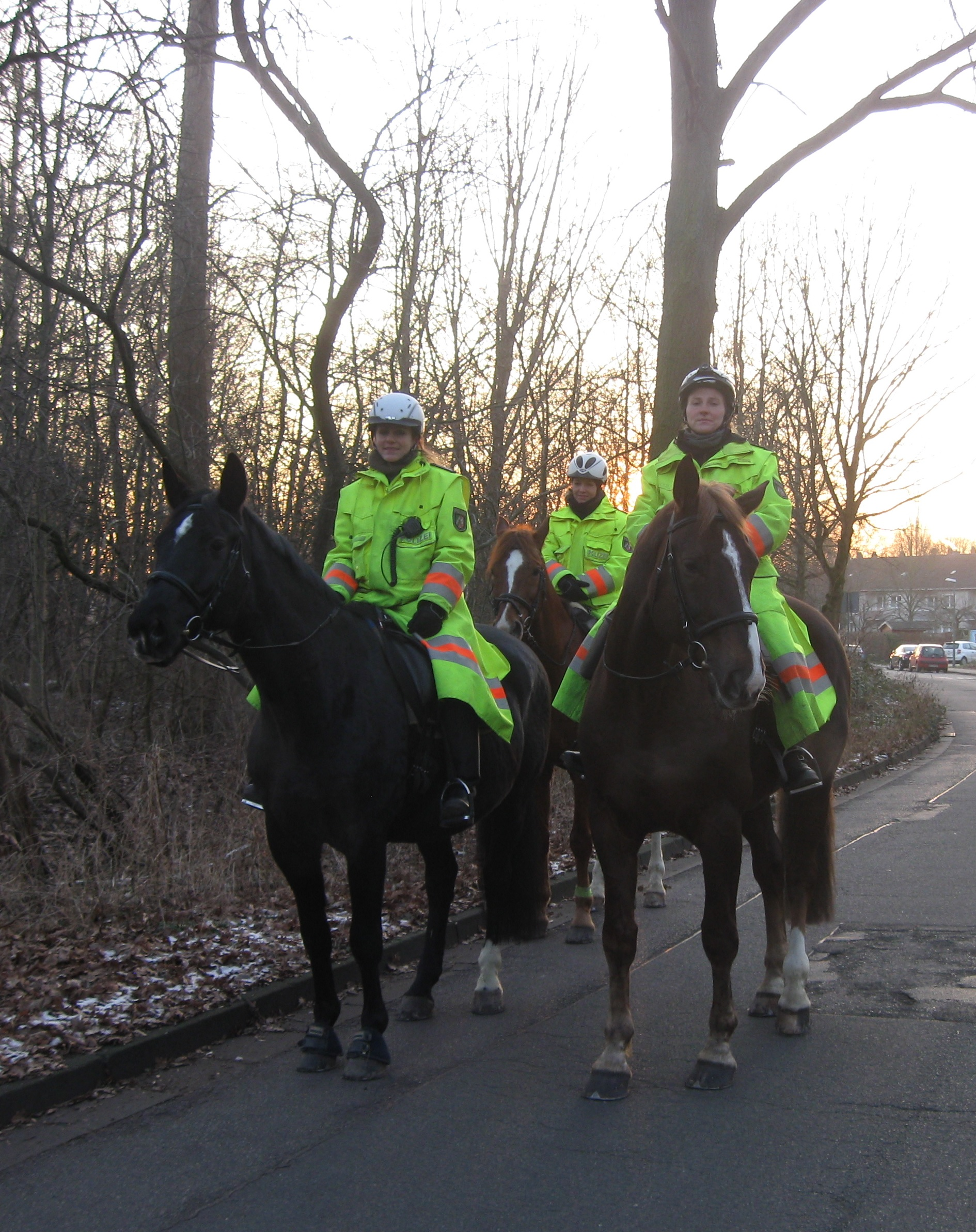 Patrouille der Landesreiterstaffel streift anlässlich einer Großveranstaltung durch ein Waldgebiet